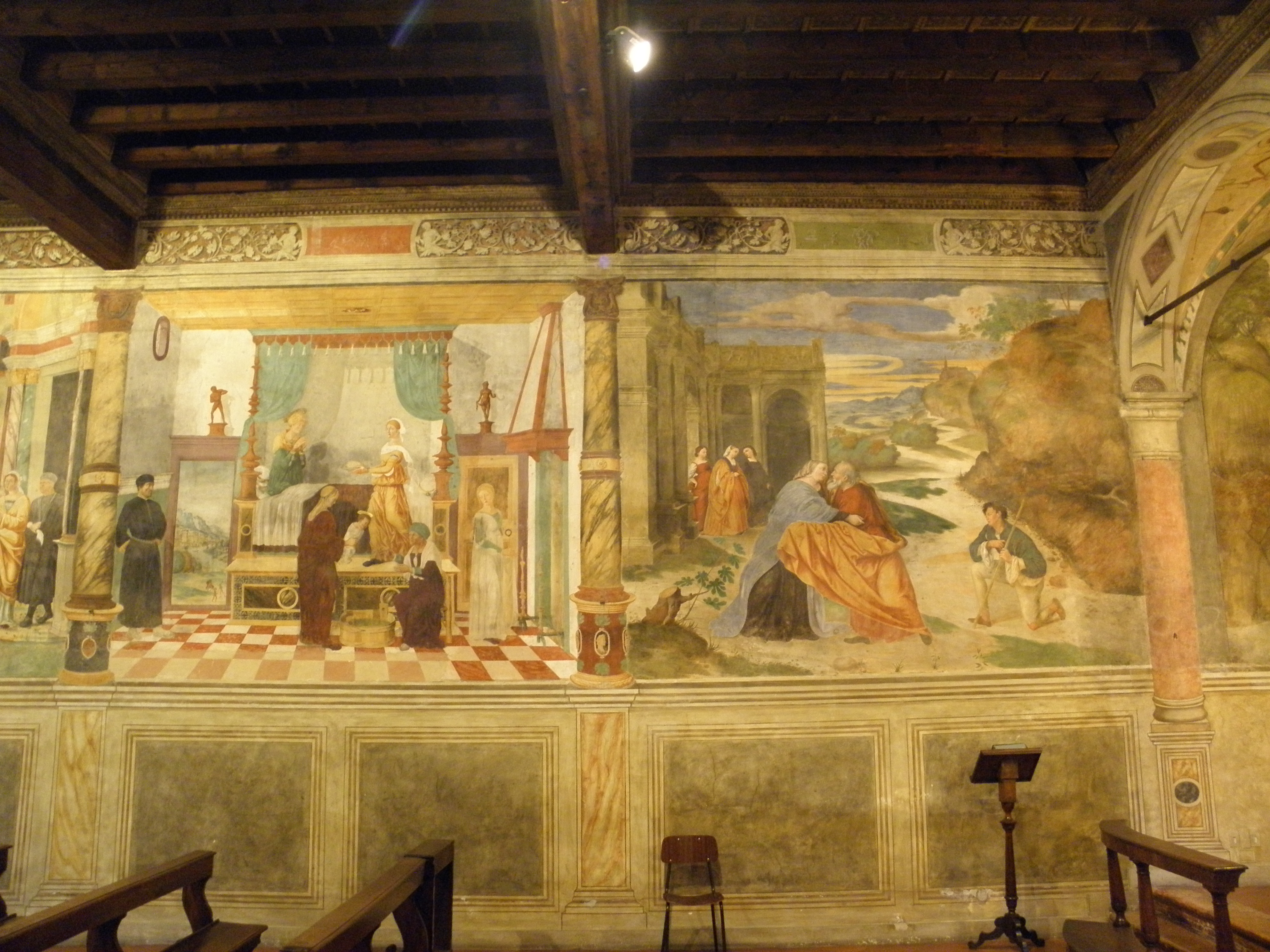 Padova, Scuola del Carmine: Ciclo della vita della Vergine Maria, a destra Incontro di Gioacchino e sant'Anna presso la porta d'oro di Domenico Campagnola, a sinistra Natività di Maria di Giulio Campagnola.